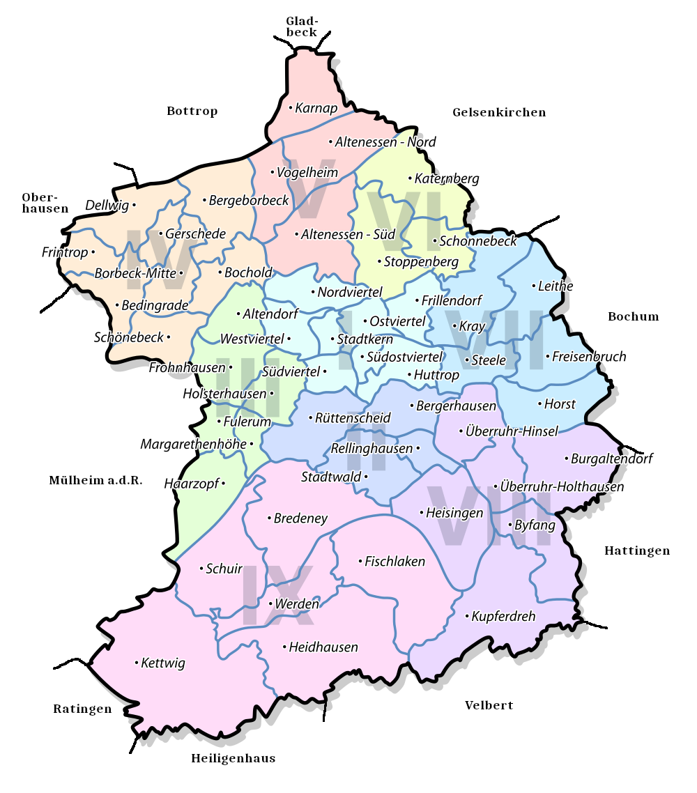 Essen - Stadtteile, Stadtbezirke und Nachbarstädte